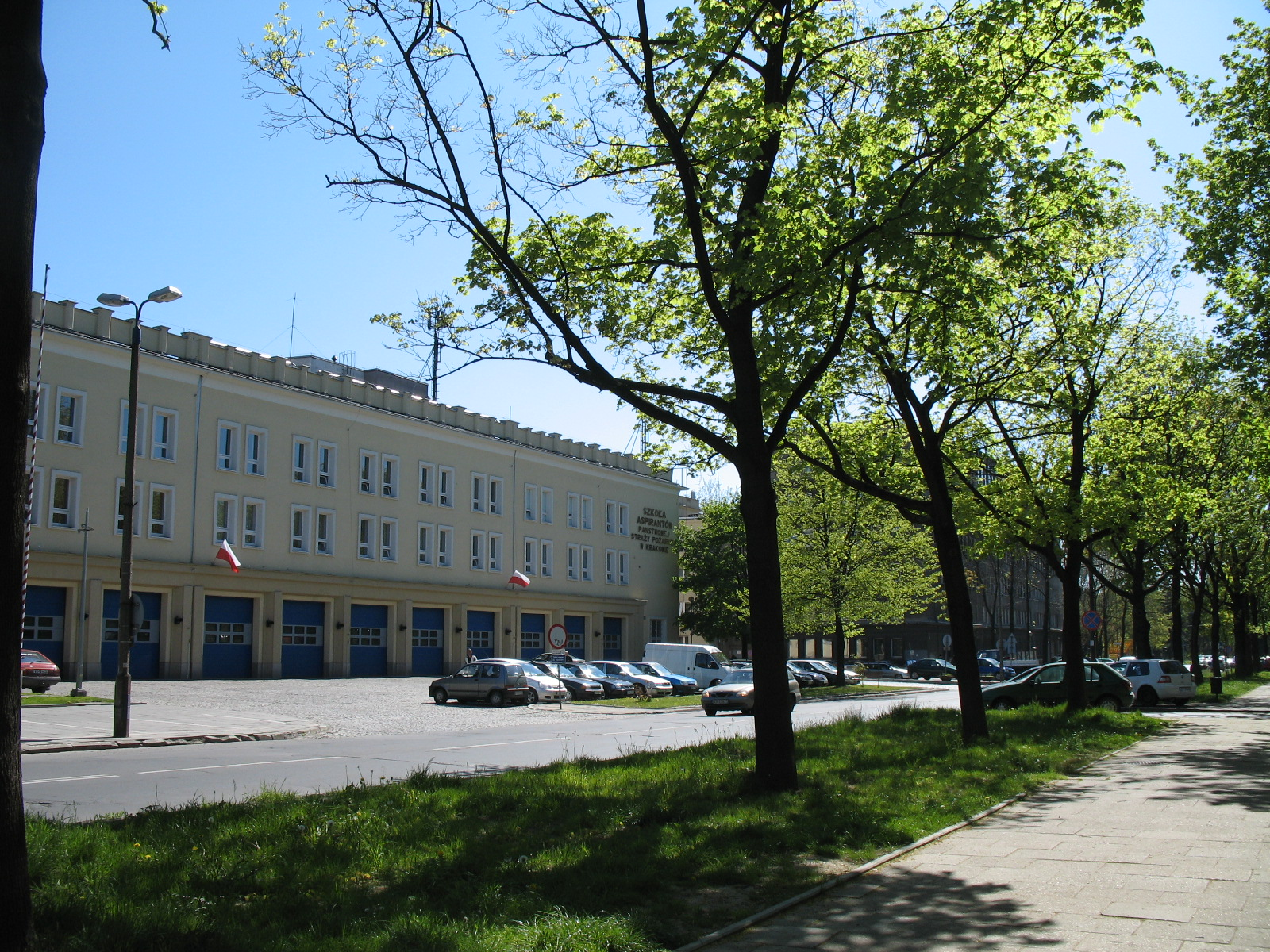 Państwowa Straż Pożarna w Nowej Hucie.